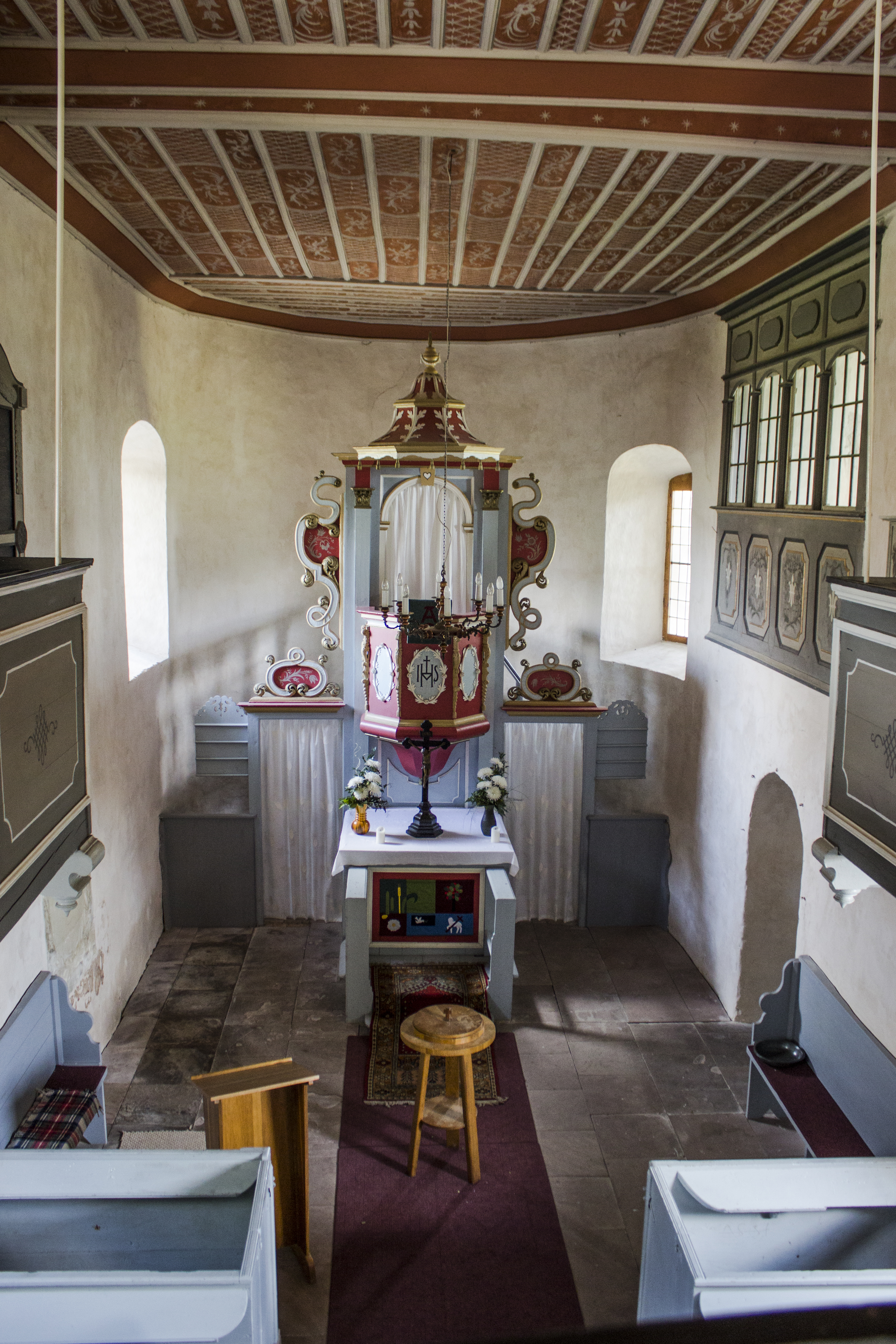 Innenansicht